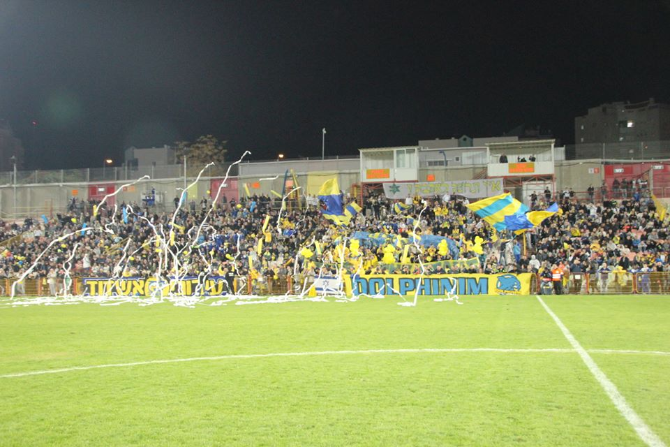 הקהל של מכבי עירוני אשדוד במשחק הדרבי.